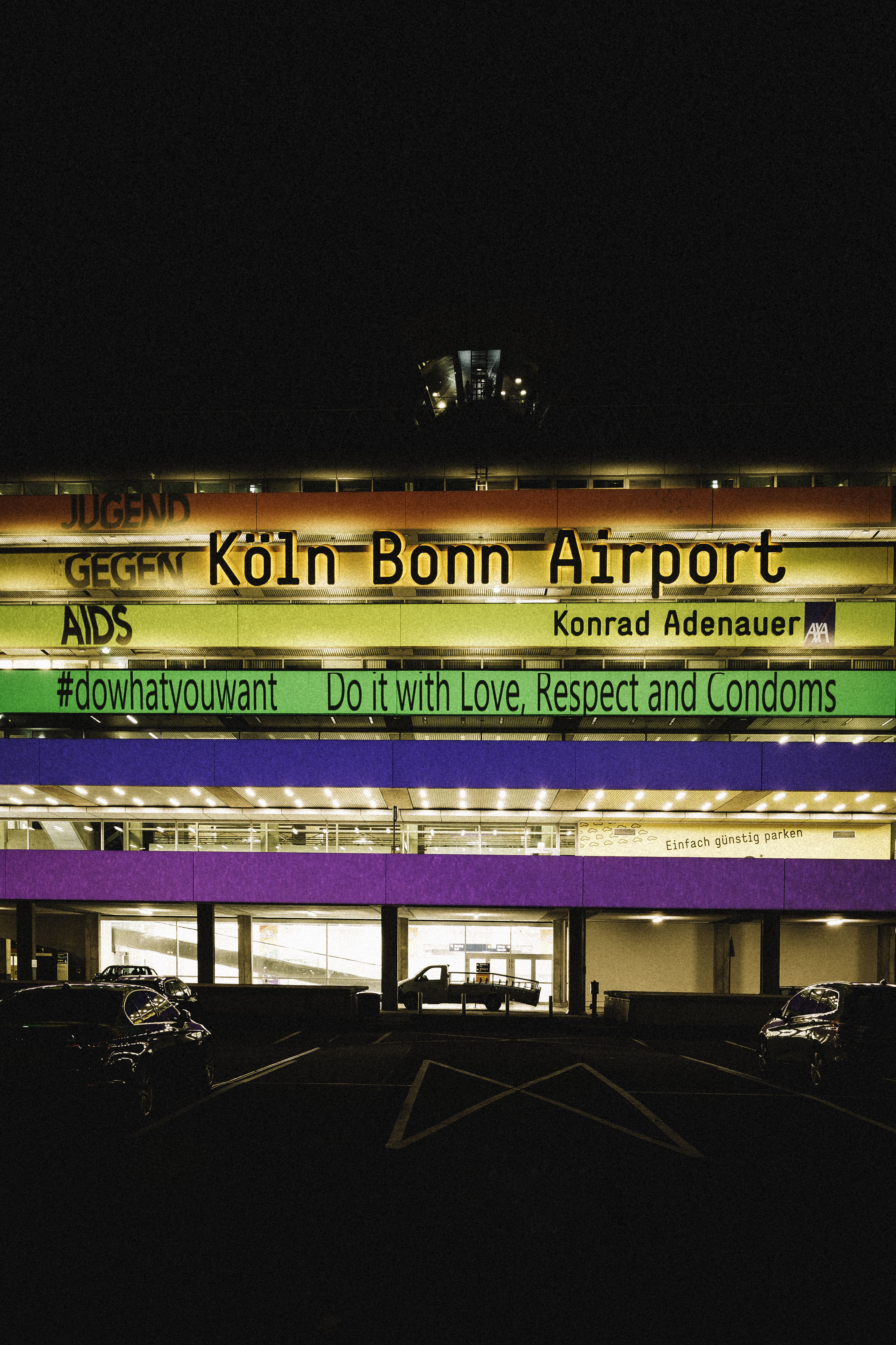 Der Flughafen Köln Bonn und die gemeinnützige Organisation haben anlässlich des Christopher Street Days in Köln gemeinsam mit Lichtkünstler Matthias Strobl das Terminalgebäude 1 in den Farben der Gay-Pride erstrahlen lassen.